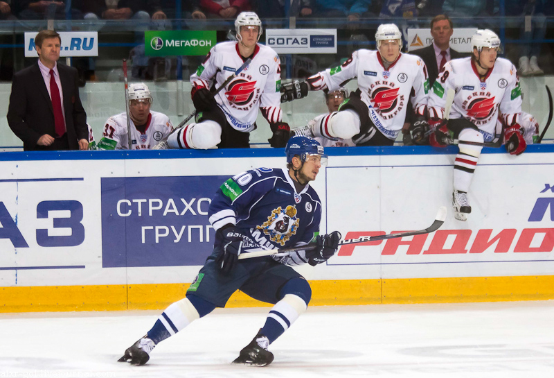 Радик Закиев в матче КХЛ «Амур» — «Авангард» 18 октября 2011 года